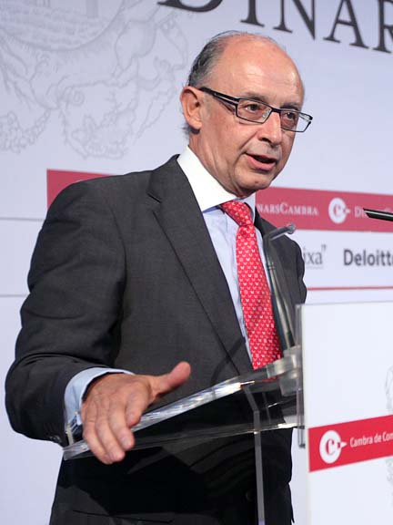 Cristóbal Montoro, Coordinador de Economía del Partido Popular, en el Dinars Cambra. Ha introducido el tema: La política económica española en la salida de la crisis.